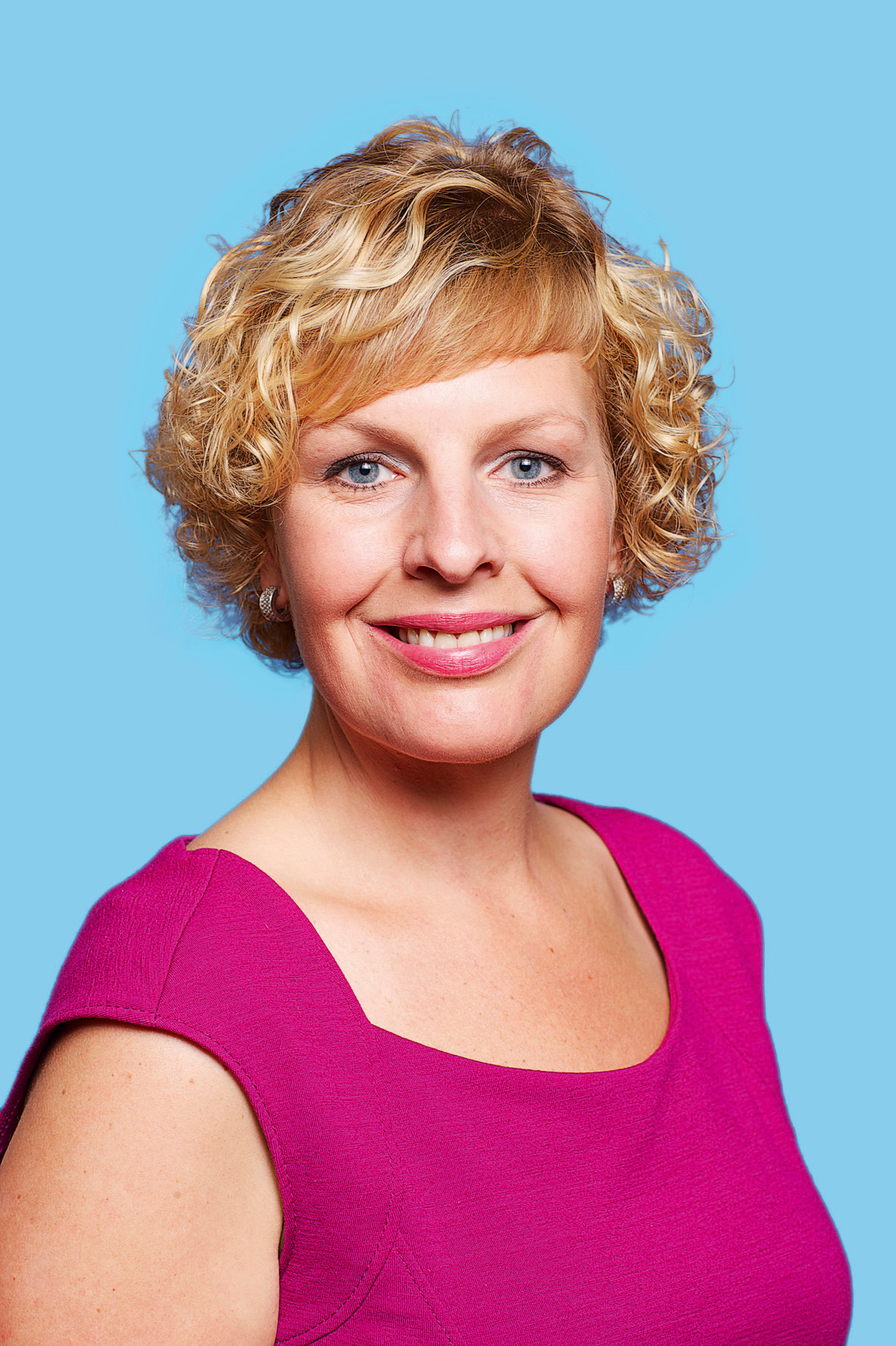 Tweede Kamerlid. Foto: Lex Draijer.